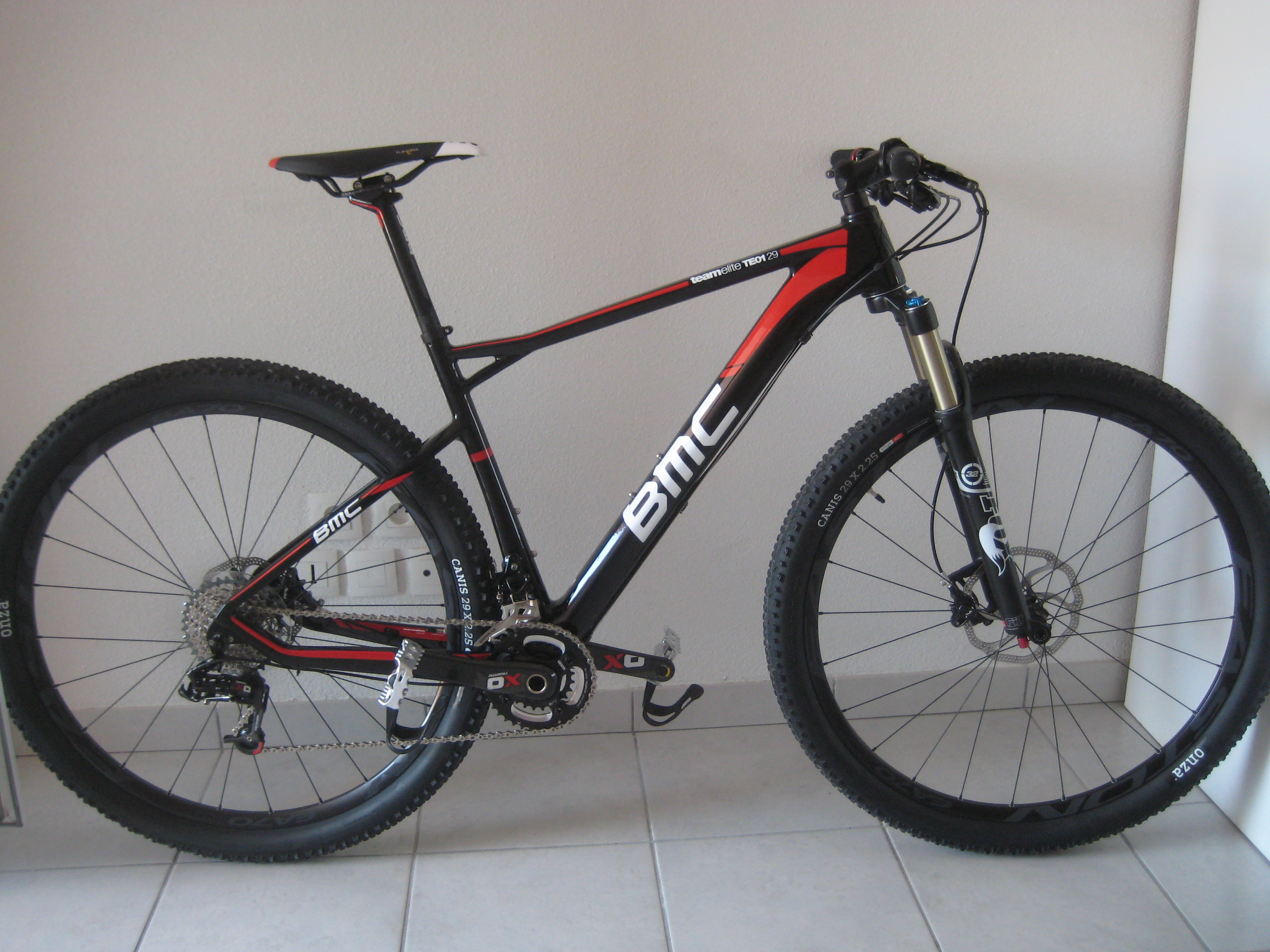 2013 cross-country hardtail mountain bike Team Elite 01 29 by Swiss constructor BMC